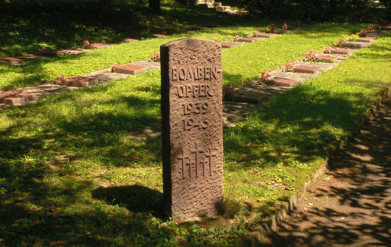 Bombenopfer auf dem Friedhof Am Wehl